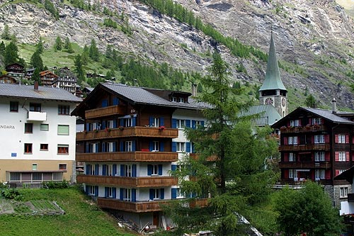 Zermatt (Blick zur Röm.-kath. Kirche)